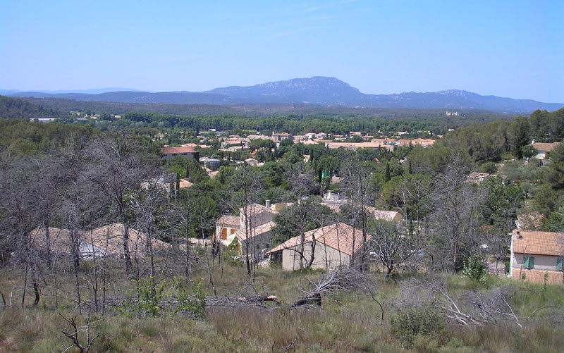 Vue de Prades le Lez depuis la colline du Mas de Prades